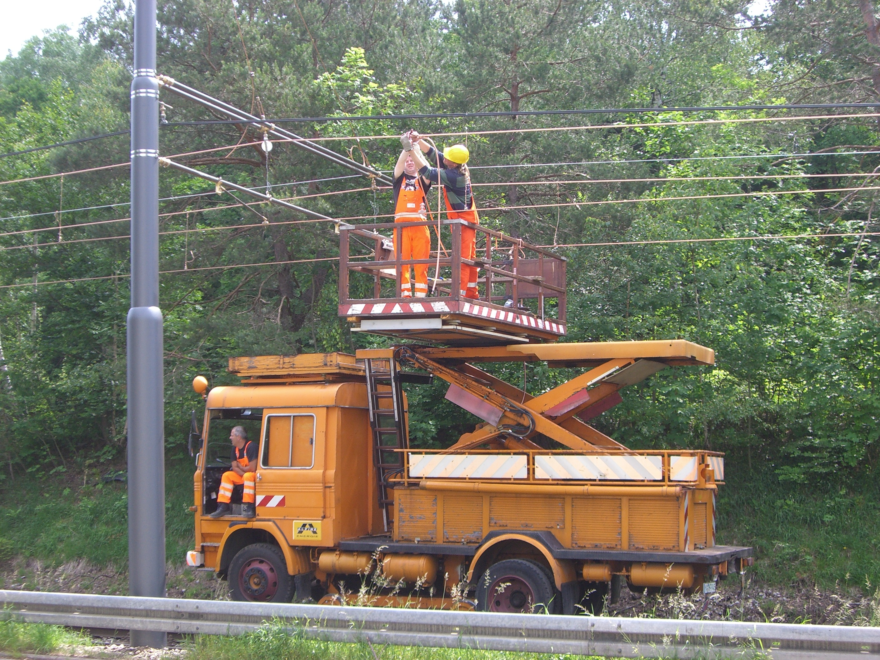 Mercedes Benz-Zweiwegfahrzeug für die Fahrleitungsmontage